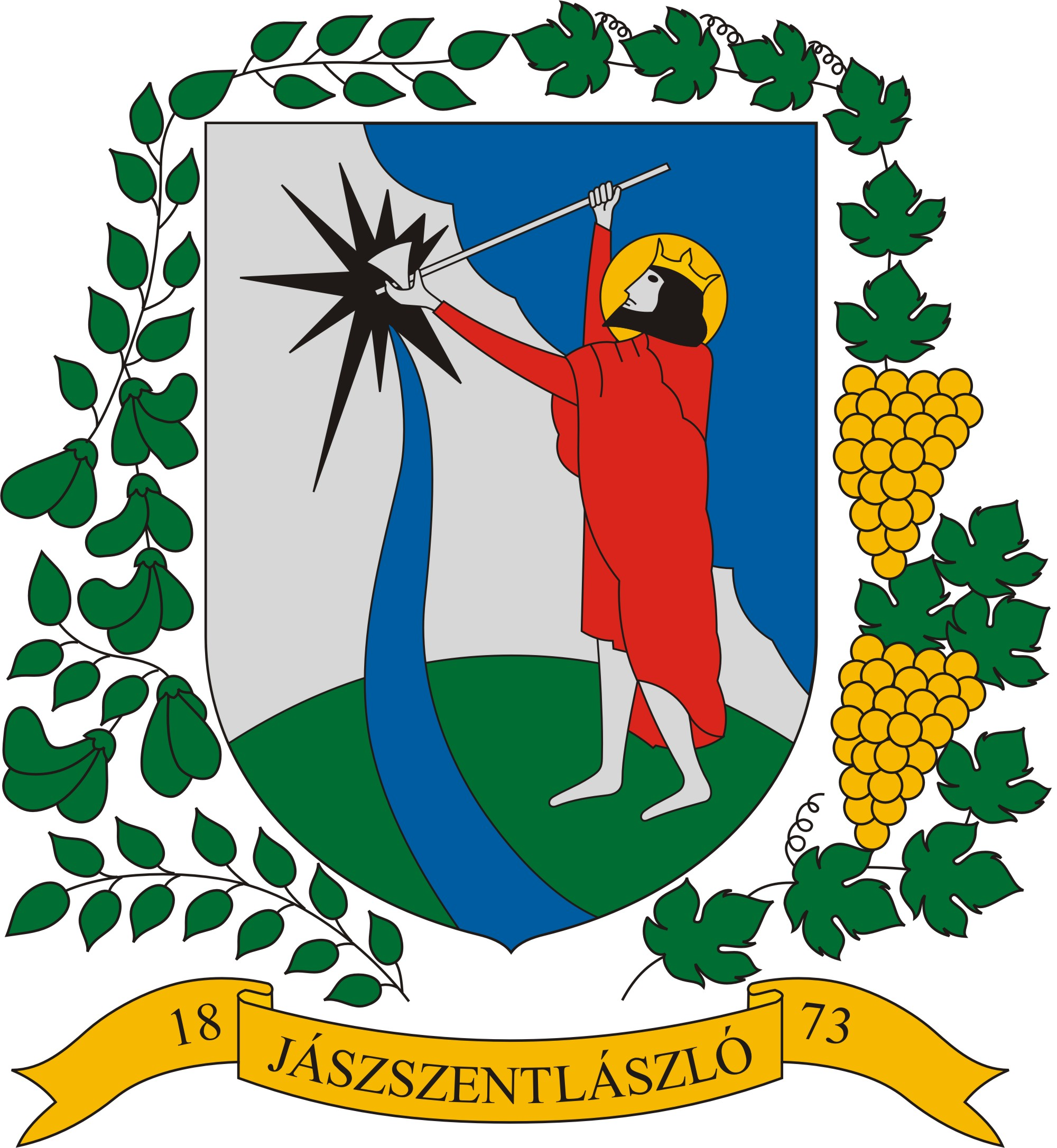 Coat of arms of Jászszentlászló, Hungary